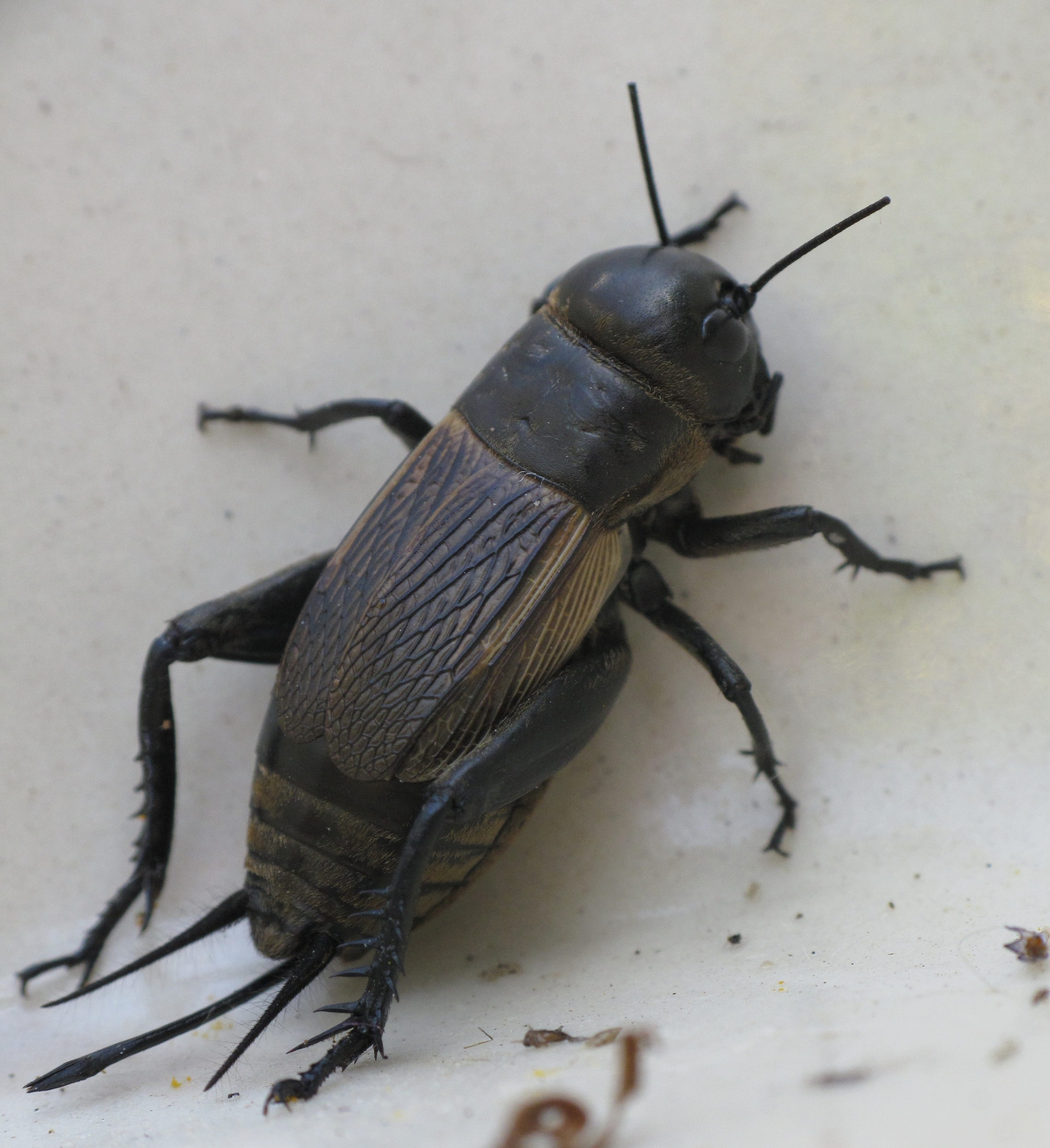 Grilo (Hembra de Gryllus campestris Linnaeus, 1758) en Bastavales, Brión, Galiza